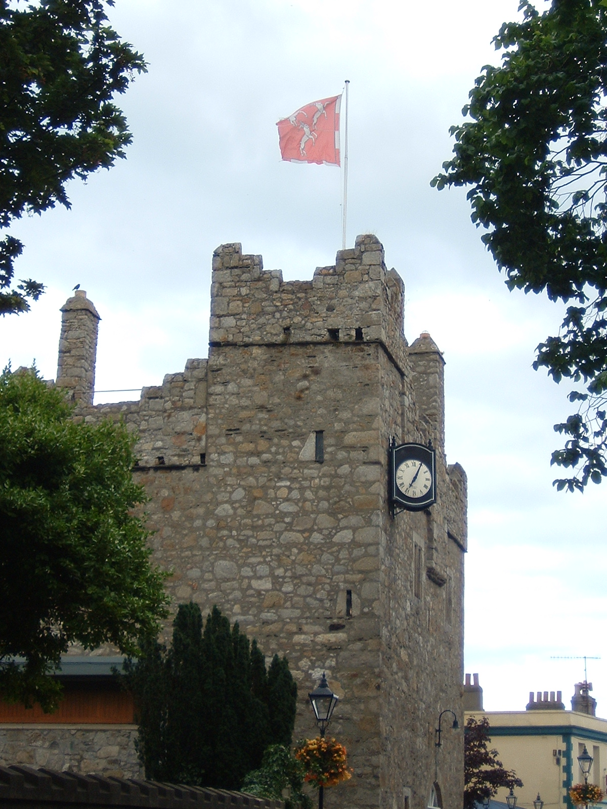 Château de Dalkey (Irlande)